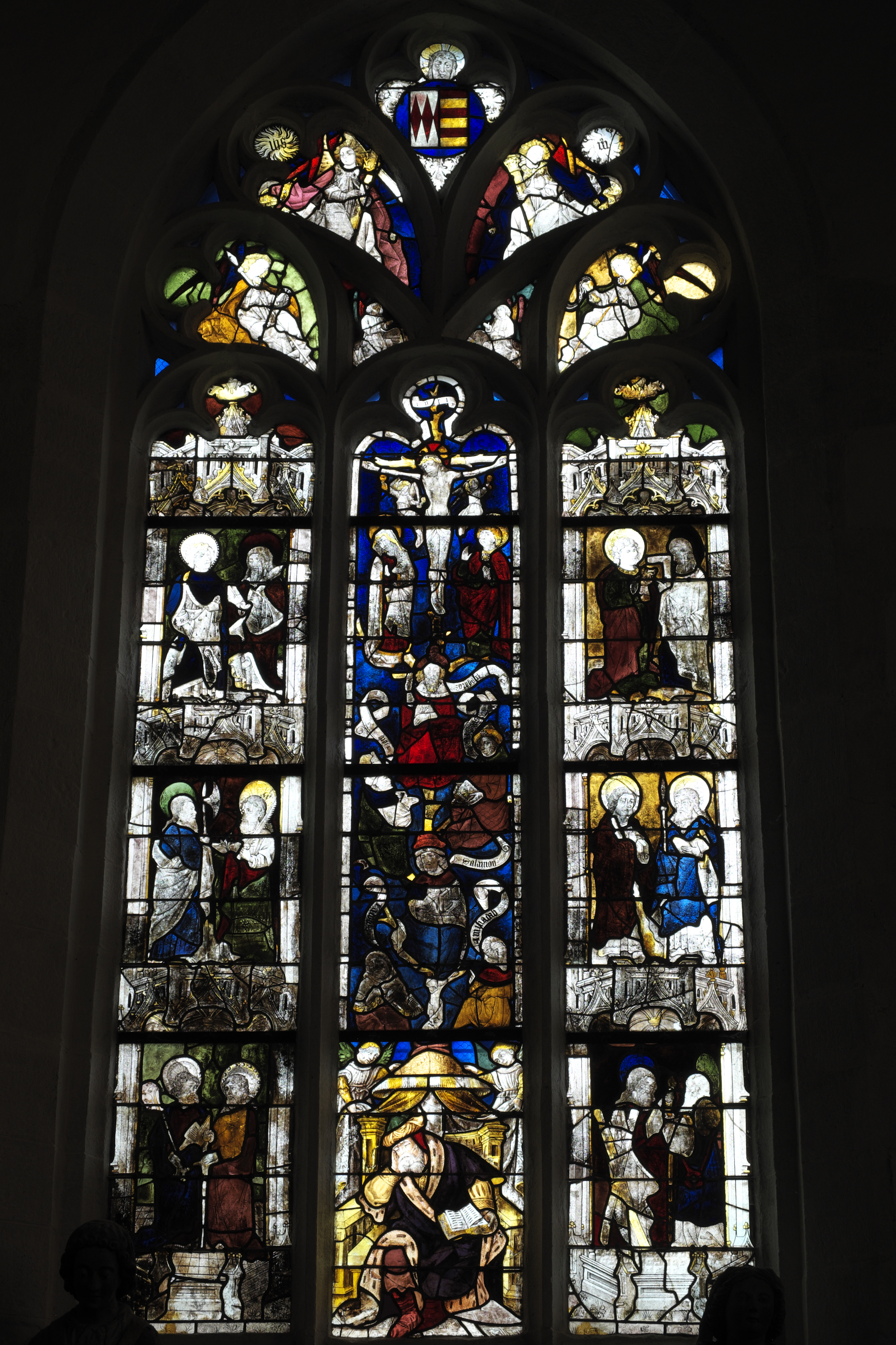 Kapelle Saint-Fiacre in Le Faouët im Département Morbihan (Region Bretagne/Frankreich), Bleiglasfenster Wurzel Jesse aus der Mitte des 16. Jahrhunderts